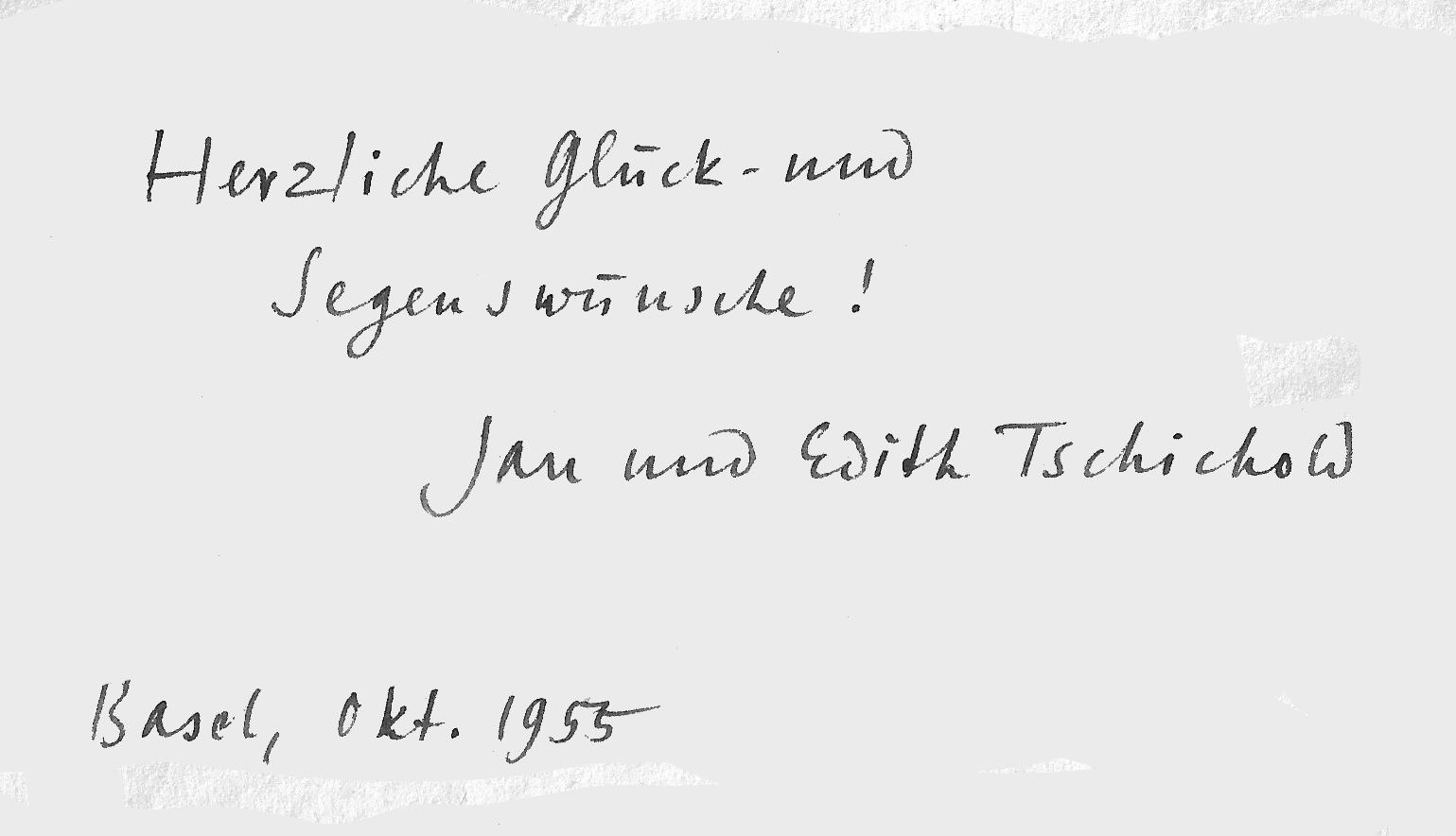 Ein mir im Oktober 1955 gesandter handschriftlicher Glückwunsch von Jan Tschichold und seiner Frau Edith.